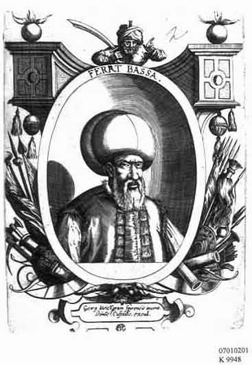 Gravure de FERHAT PASA SOKOLOVIC